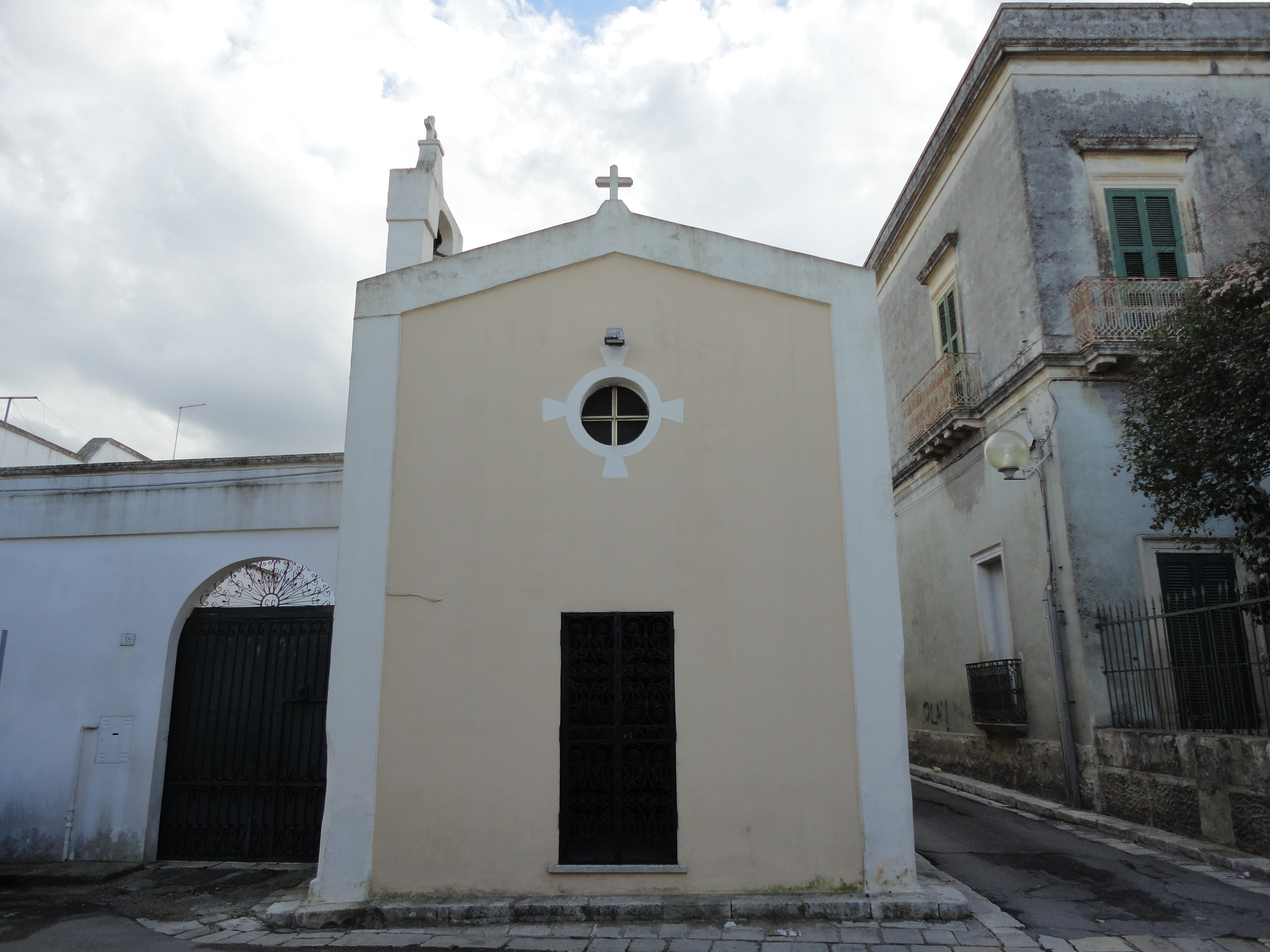 Madonna dei Martiri Squinzano, Lecce